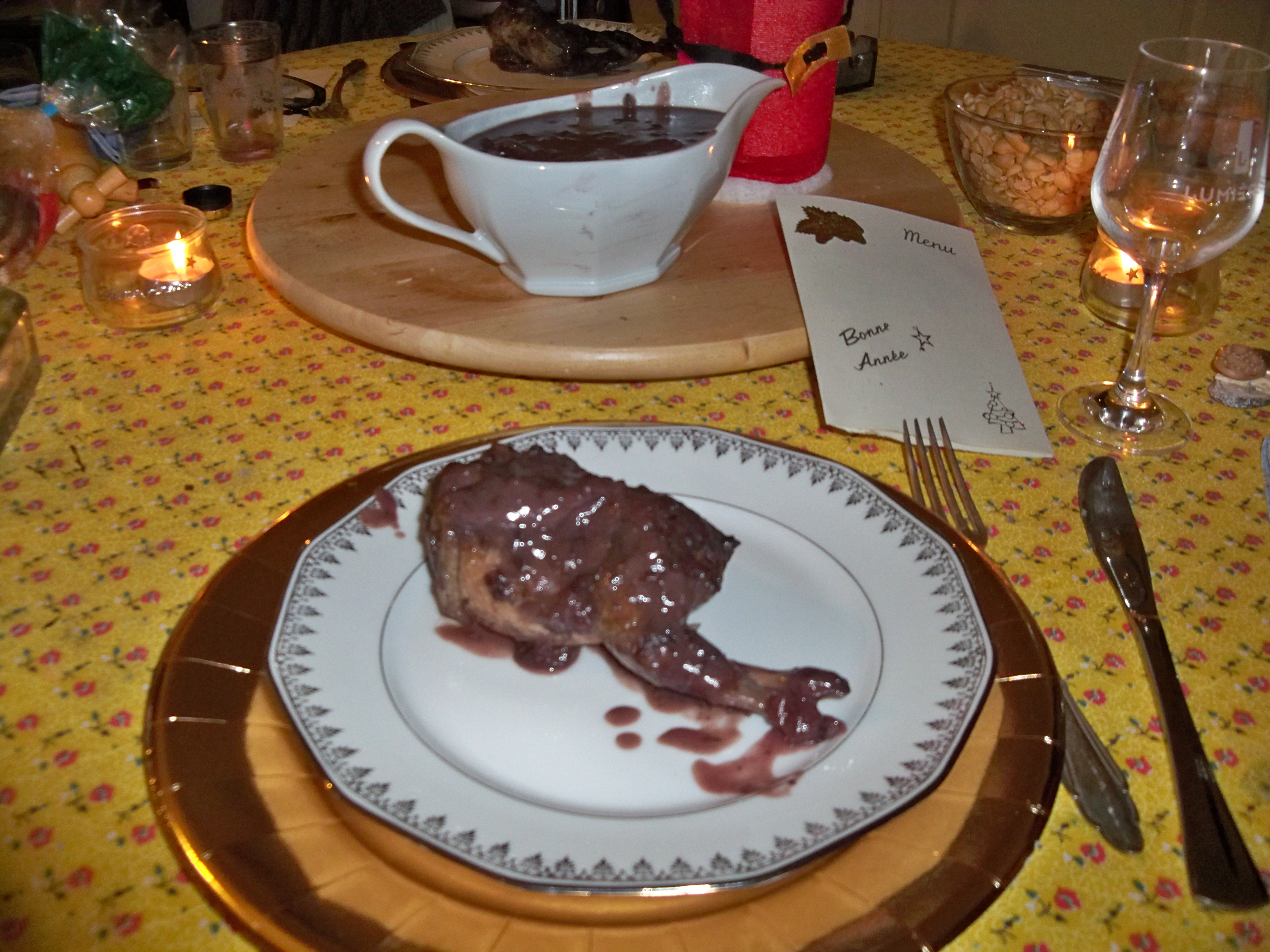 caille en salmi